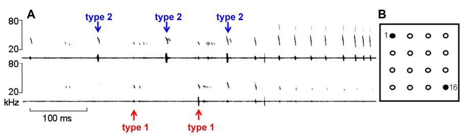 Le micro supérieur recueille les signaux de type 2 et les signaux d'approche avec l'amplitude la plus grande, le micro du bas recueille le signal de type 1